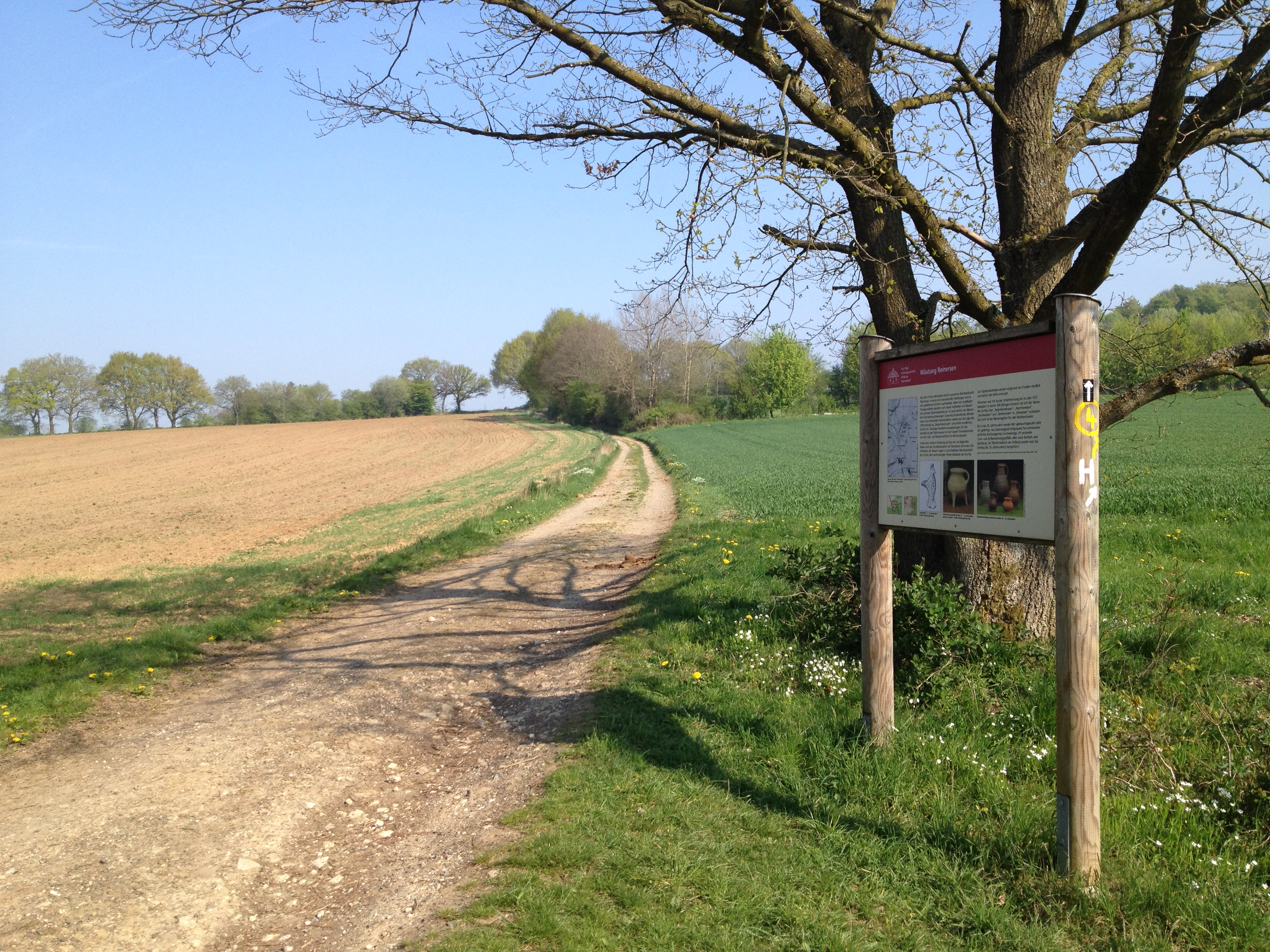 Die Station Wüstung Reinersen des Eco Pfades Kulturgeschichte Ahlberg-Mariendorf. Über den Wirtschaftsweg verlaufen auch die Wanderwege Reinhardswald-Westweg (H), Hugenottenweg (I 5), Um den Ahlberg (I 6), Ʌ (Roter Stock - Westuffeln) und der Rundweg 4, sowie der Reinhardswaldradweg (Kassel - Wülmersen)